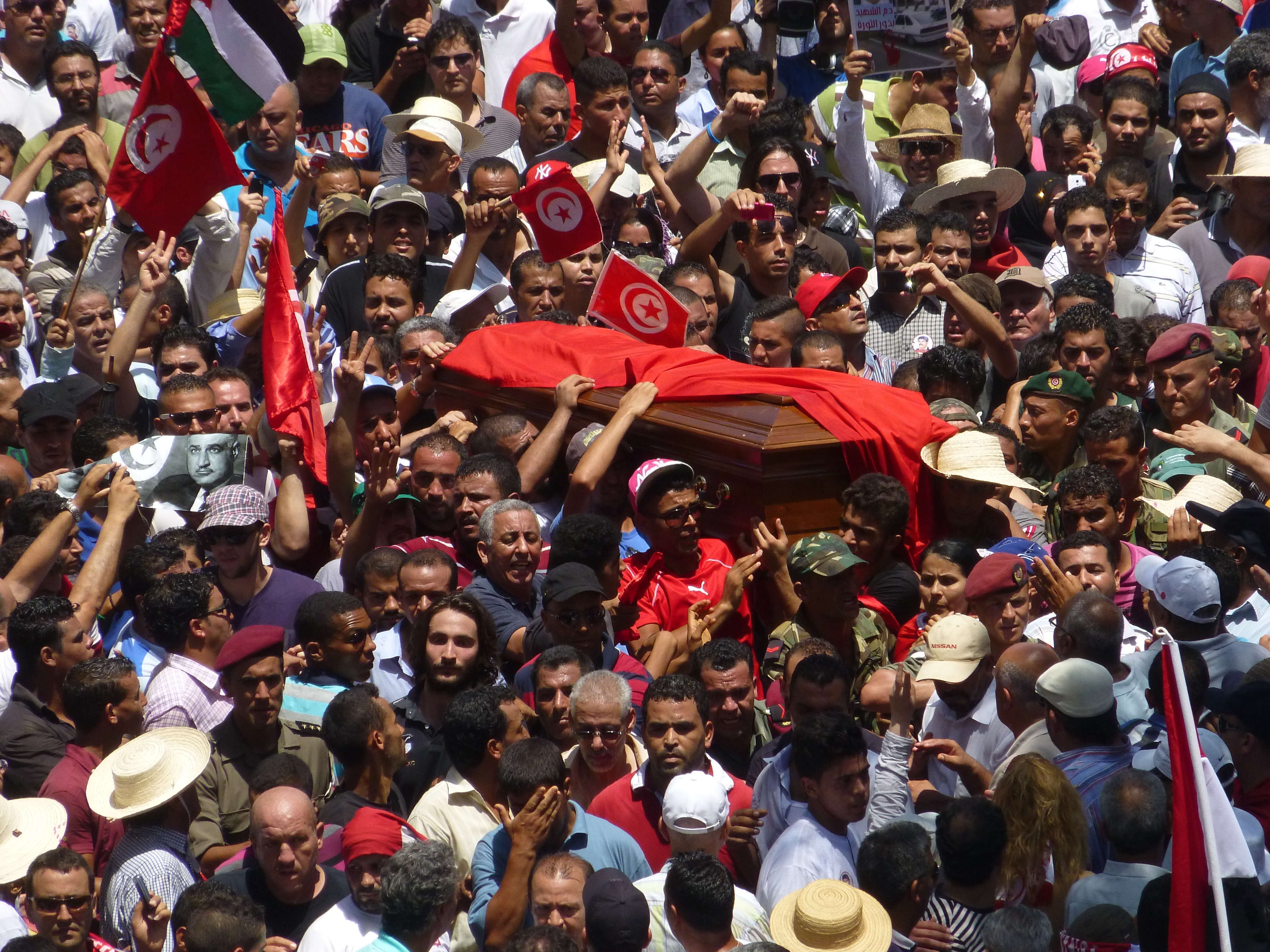 Cérémonie d'enterrement de Mohamed Brahmi dans le carré des martyrs du cimetière du Djellaz, Tunis